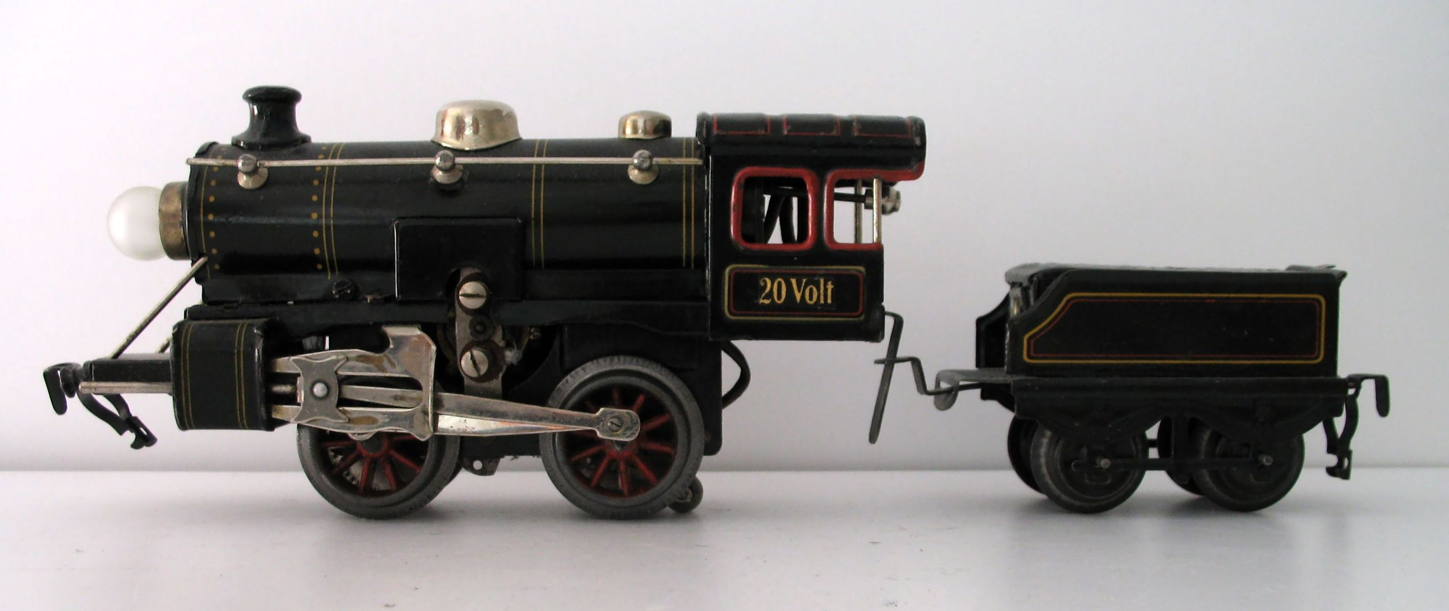 typische Kraus Fandor Lok